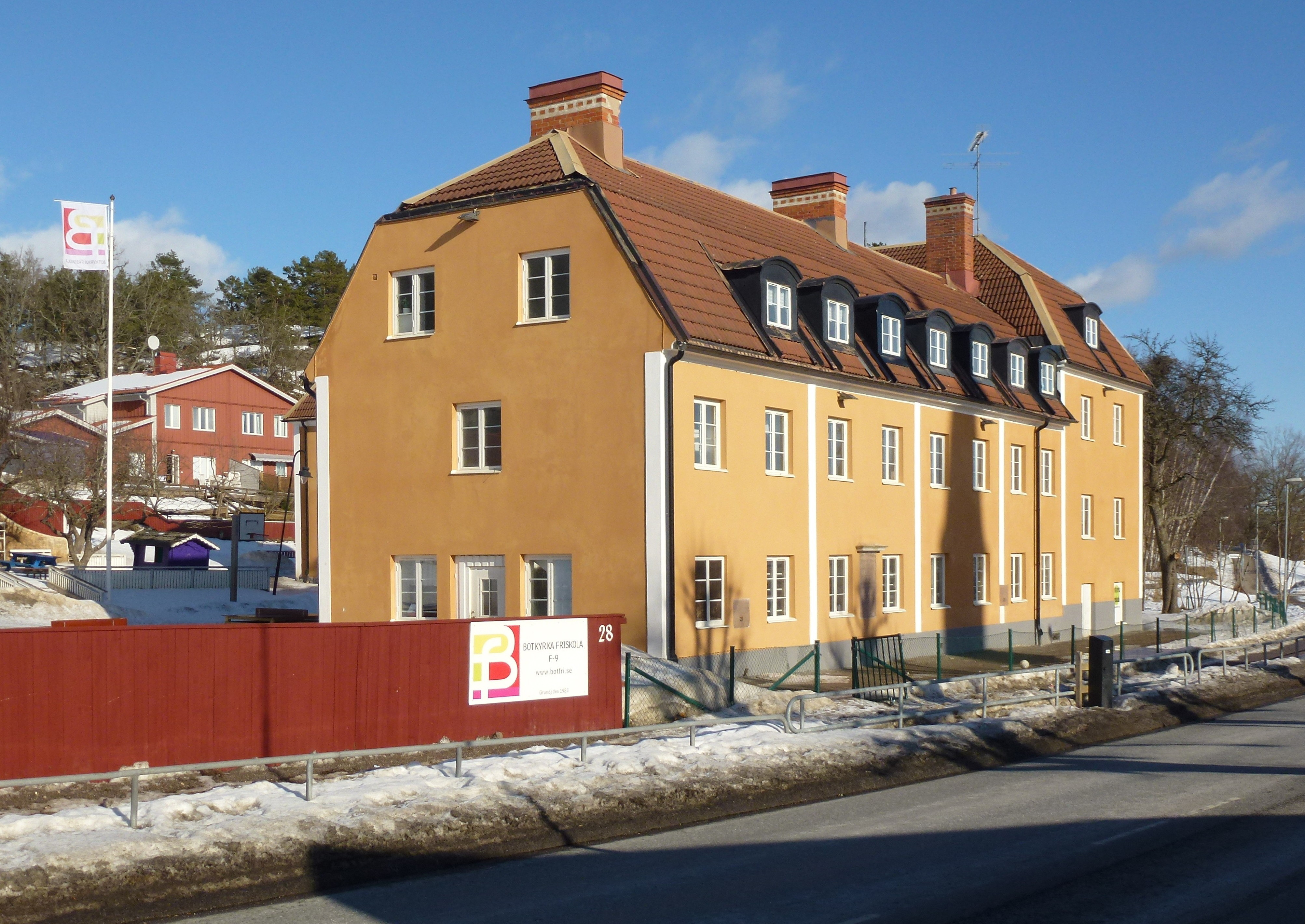 Fattighuset vid Botkyrka kyrka, nu Botkyka friskola